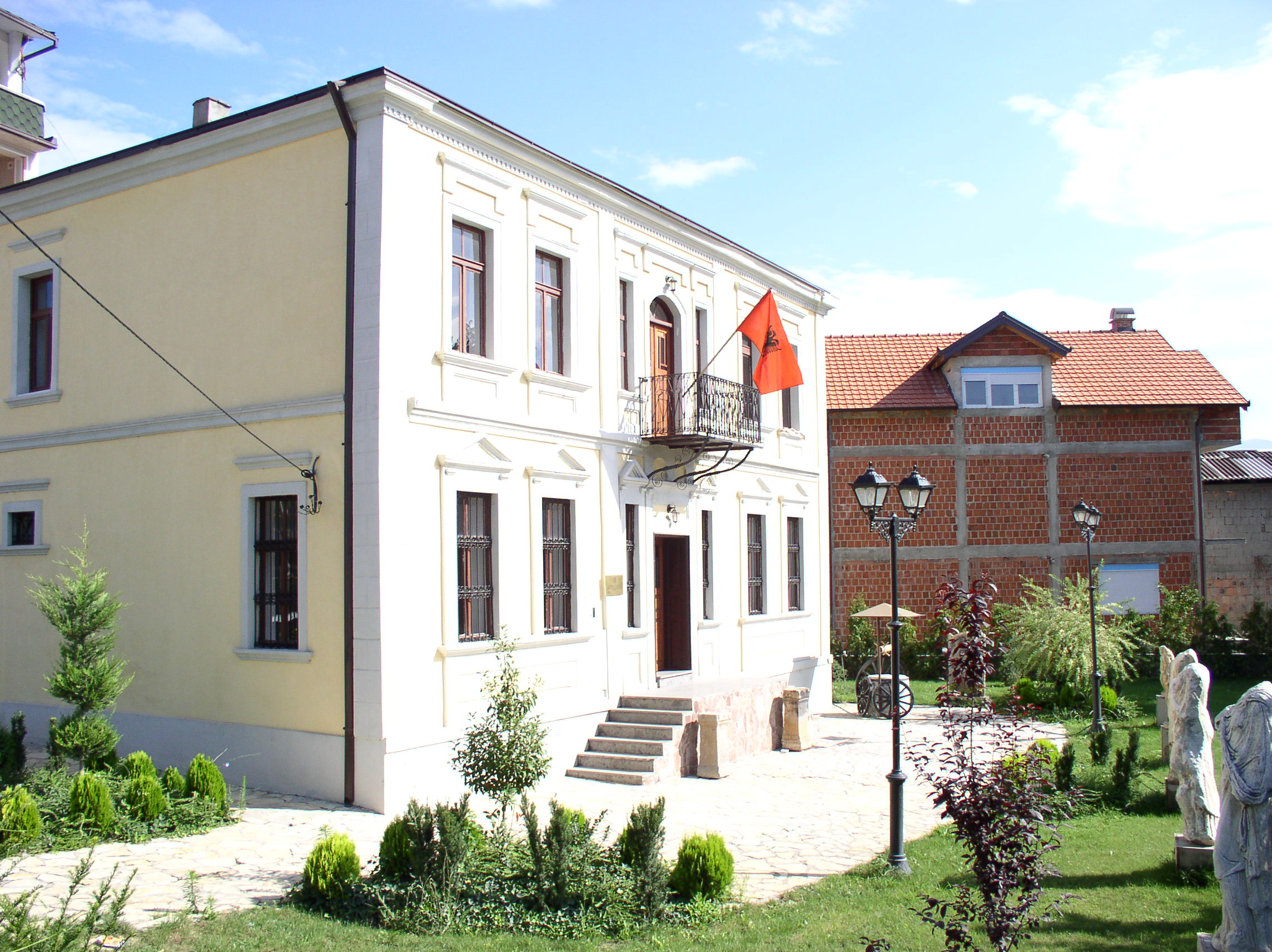 Kumbaradži kuća u naselju Čair u Skoplje